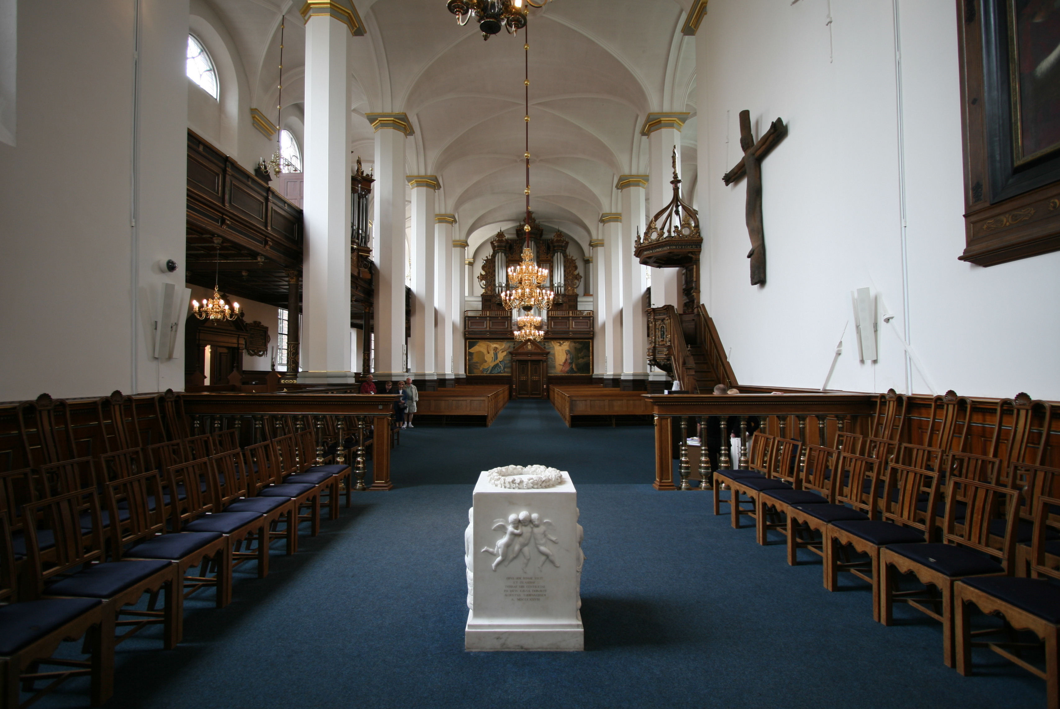 Helligåndskirken, Copenhagen, Denmark. Interior from altar, wide angle.